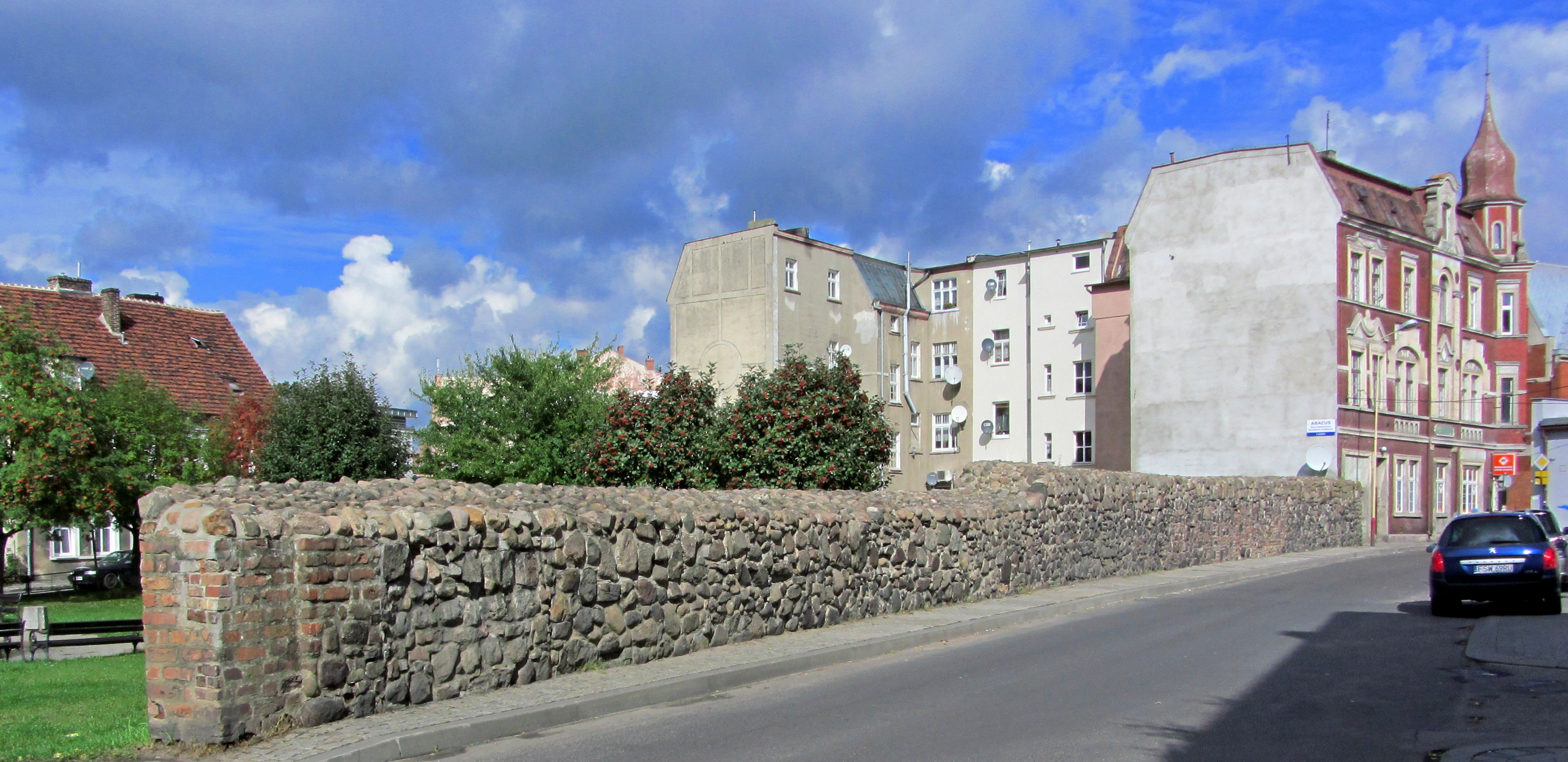 Świebodzin - mury miejskie przy ul. Okrężnej